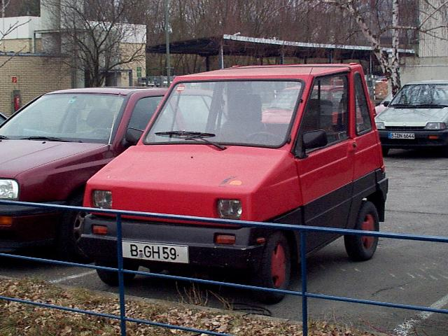 Electric Car Puli Pinguin 4. Picture taken 1999.